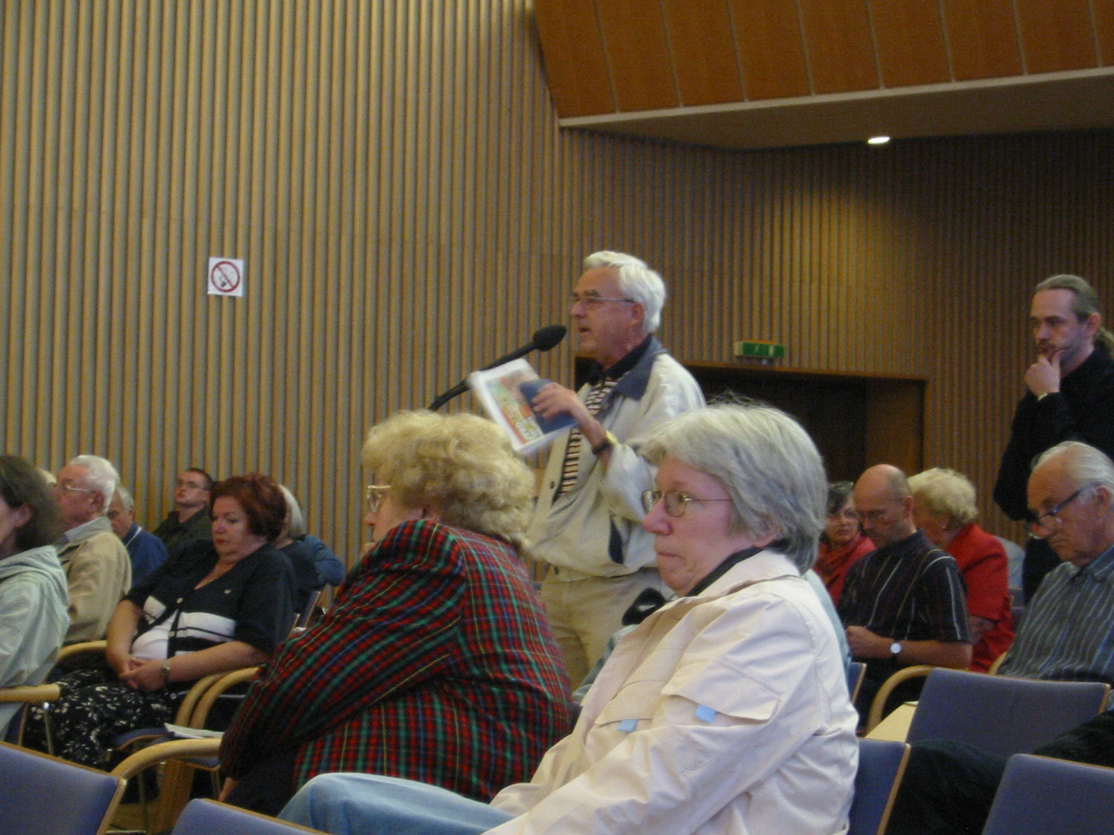 Bürger Dresdens gegen WOBA Verkauf am Mikrofon